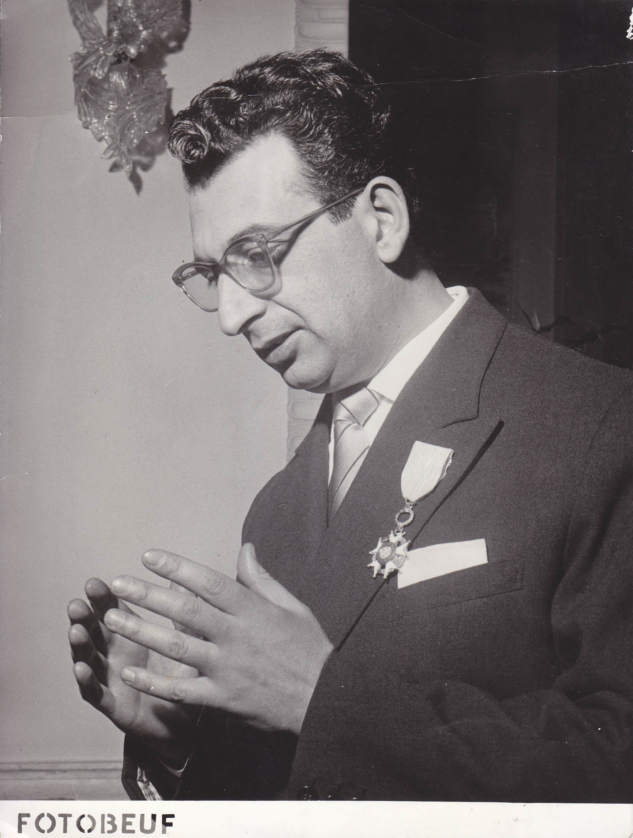 Il Professor P.A. Jannini riceve la Croce del Sud